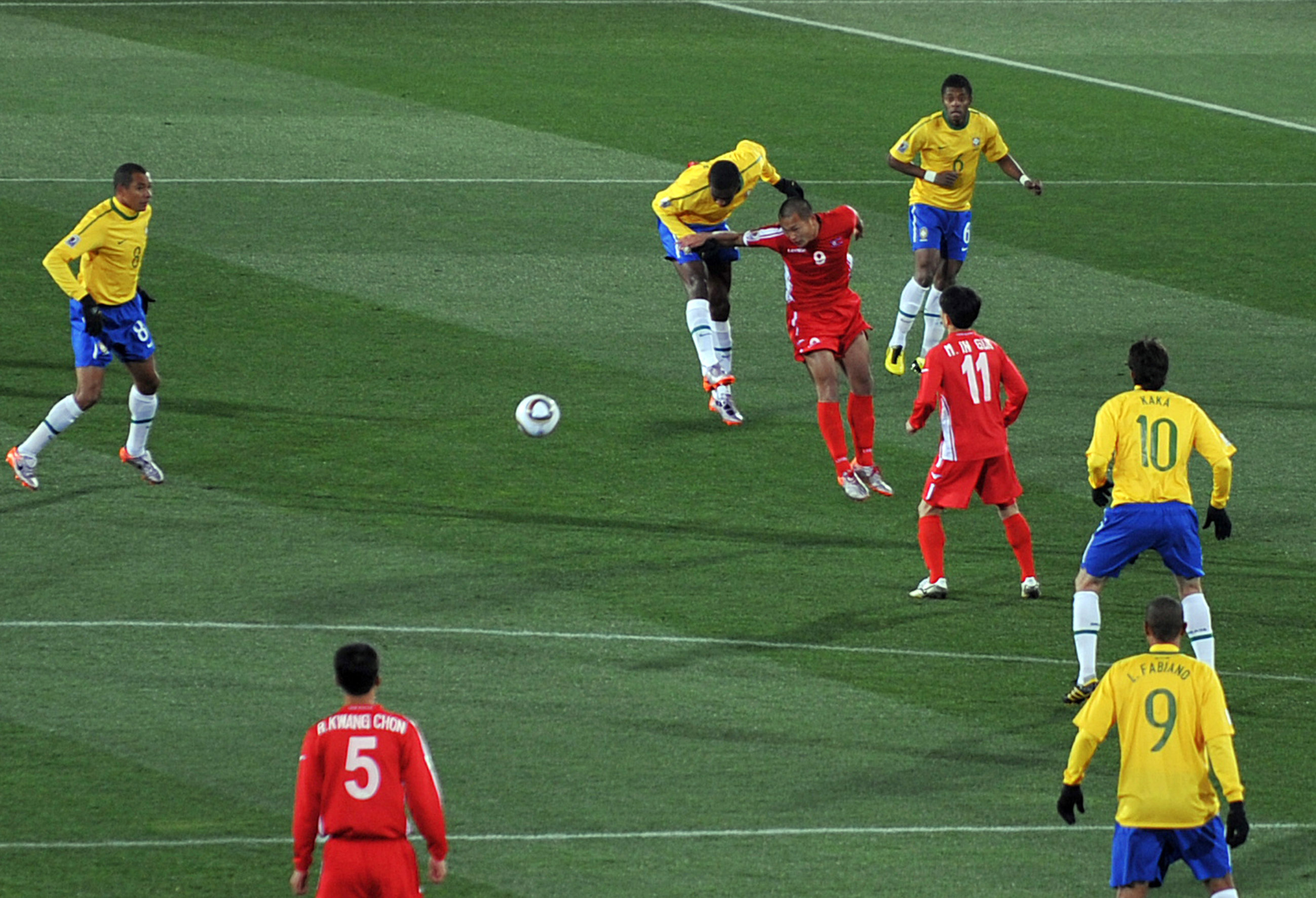 Seleção brasileira estreia na Copa do Mundo de 2010 contra a Coreia do Norte.